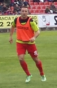 Jugador del Girona FC